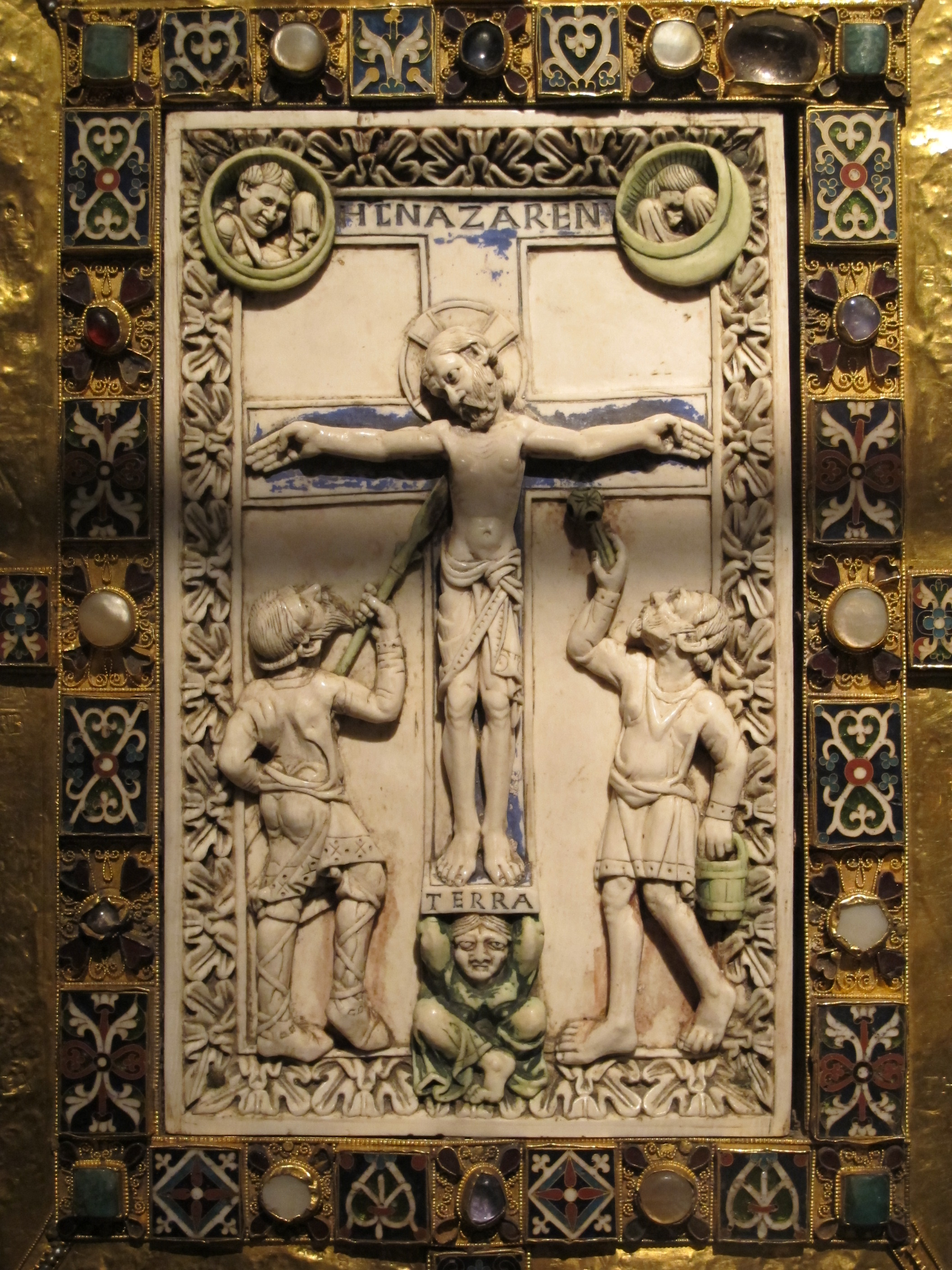 Coperta del codex aureus, treviri, 985-987